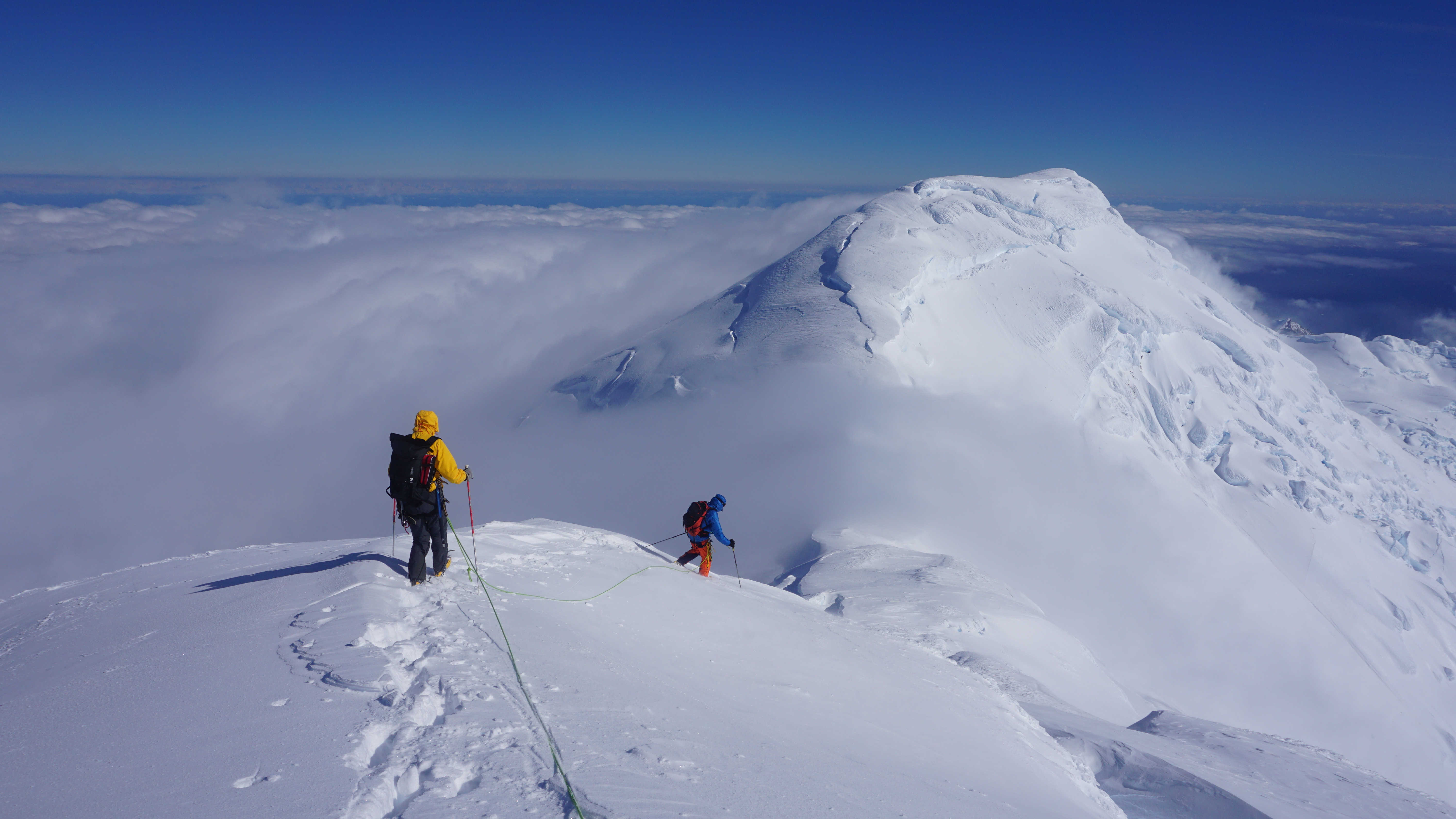 в.Симеон